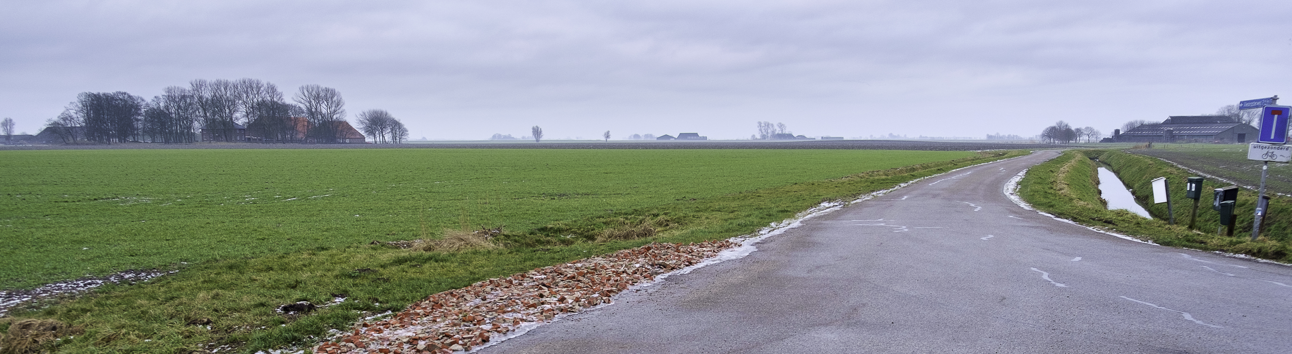 Buurtschap De Hoogte met links boerderij De Hoogte en rechts boerderij Westerhuis